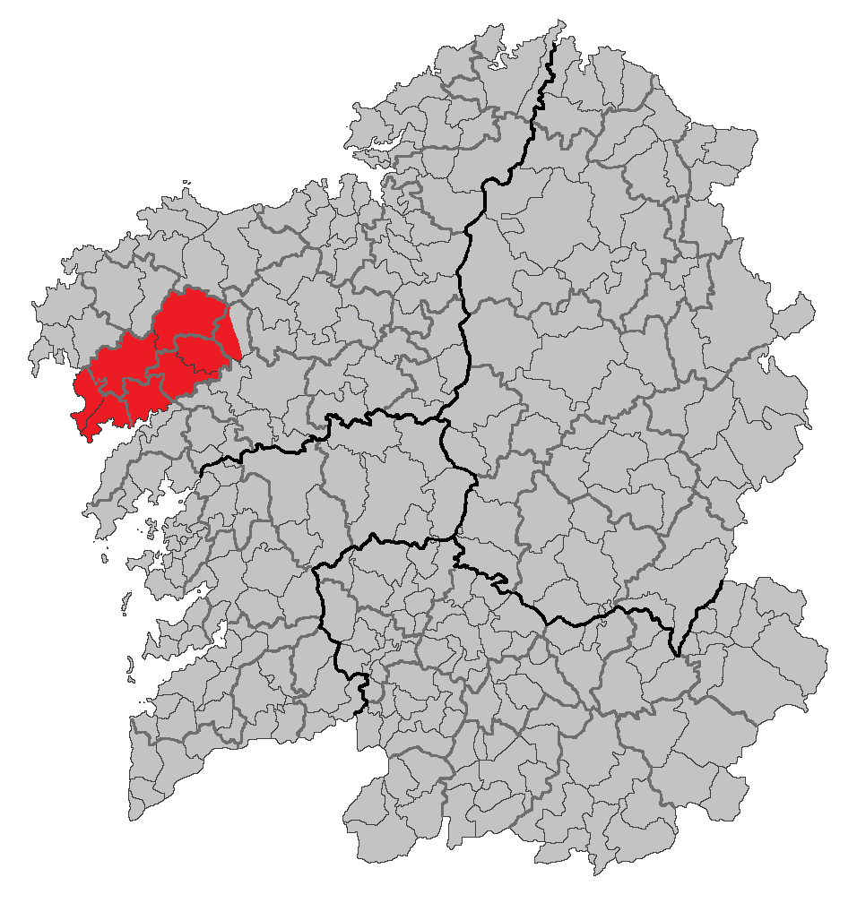 Mapa da Comarca de Carnota e relación aproximada cos lindes municipais actuais